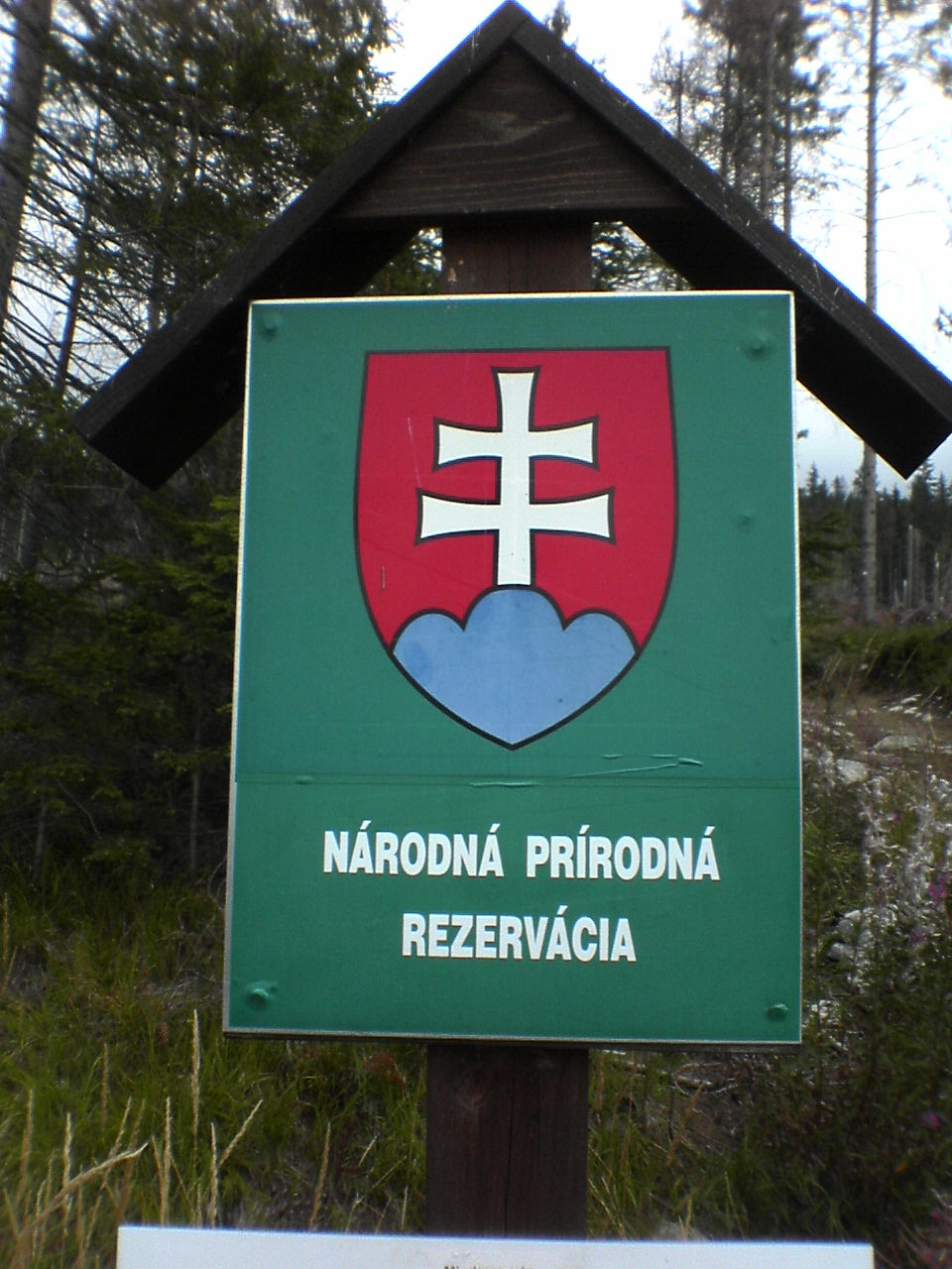 Národná prírodná rezervácia